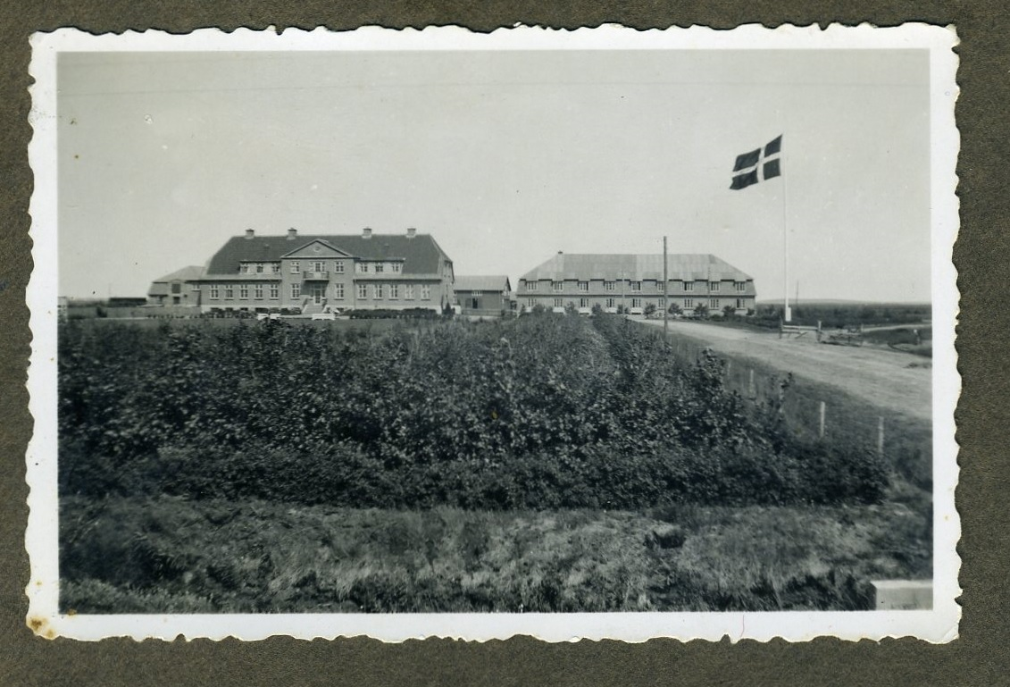 Centralgården ca. 1940